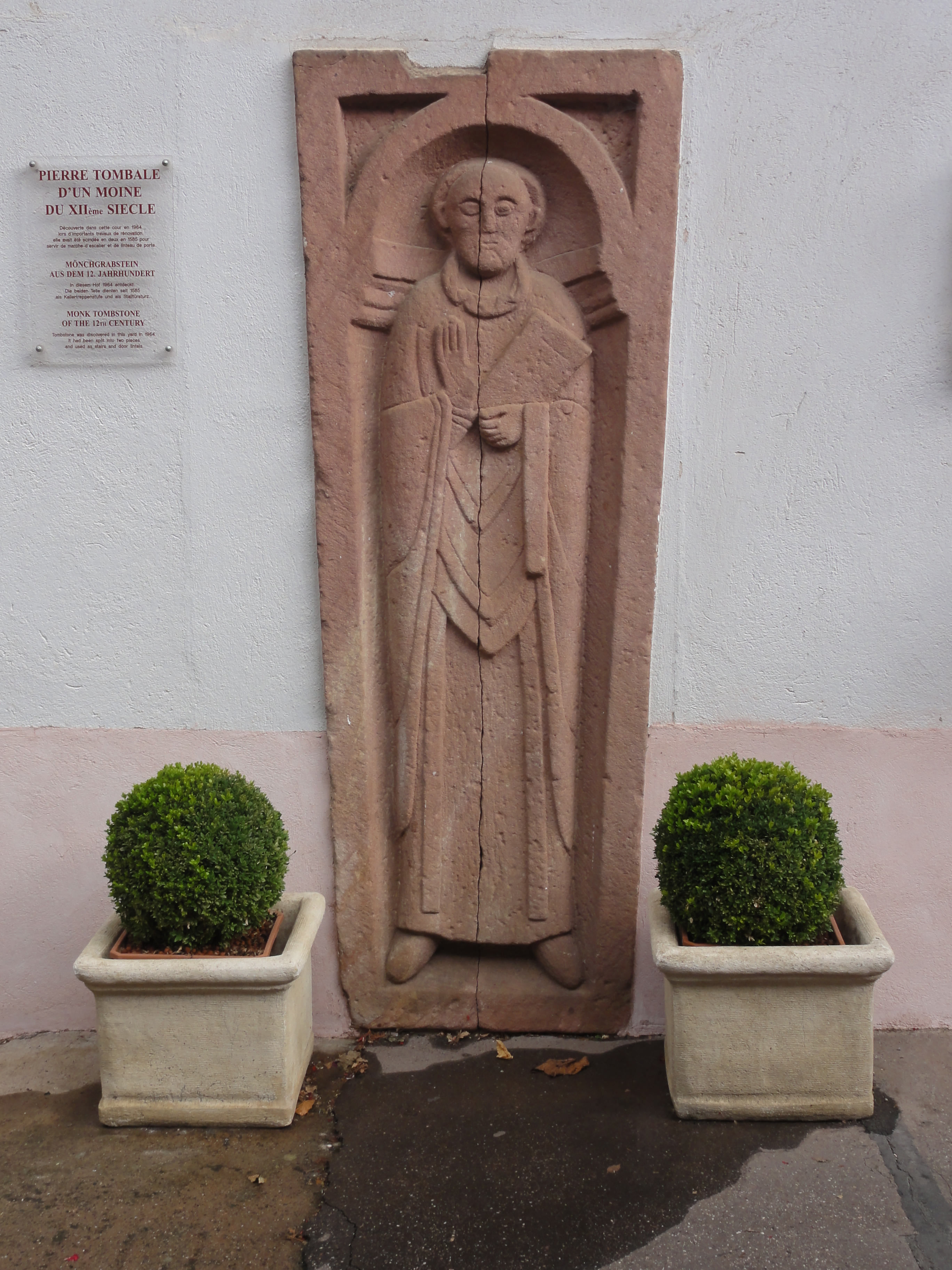 Alsace, Bas-Rhin, Mittelbergheim, Maison de boulanger/vigneron (XVIe), 2 rue du Rotland: . Dalle funéraire (XIIe)